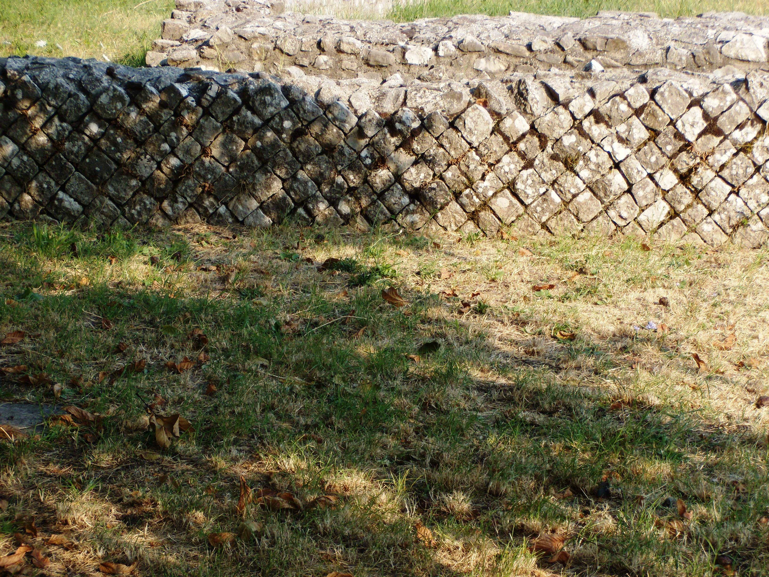 Scavi archeologici di Saepinum (Italy): mura in opera reticolata di epoca romana.